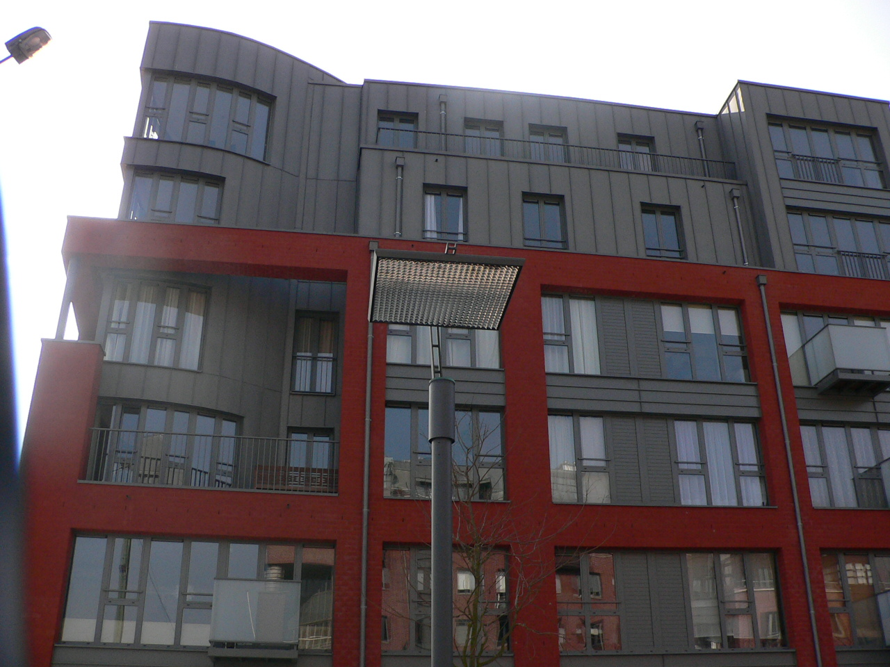 Crédit photographique de Mario Scolas - Rive Gauche Bruxelles